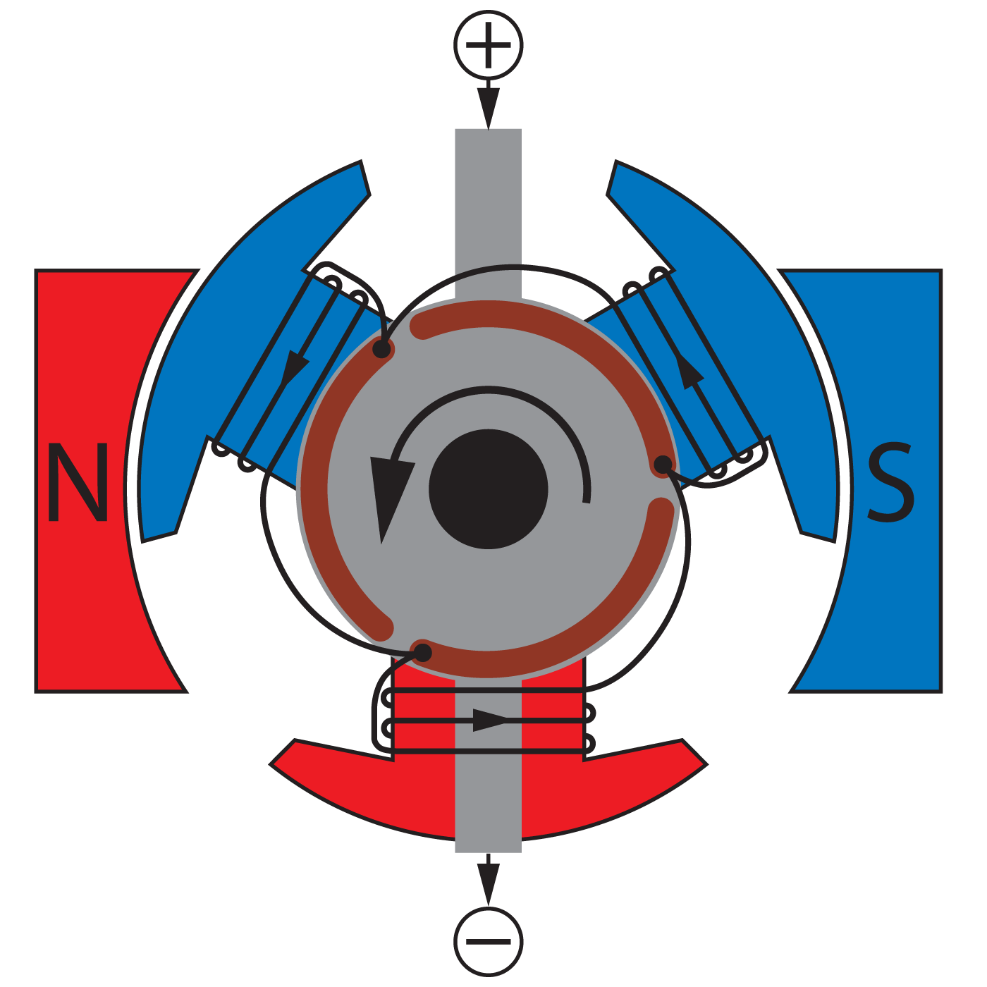 Electri Motor 3 Pole permanent magnet